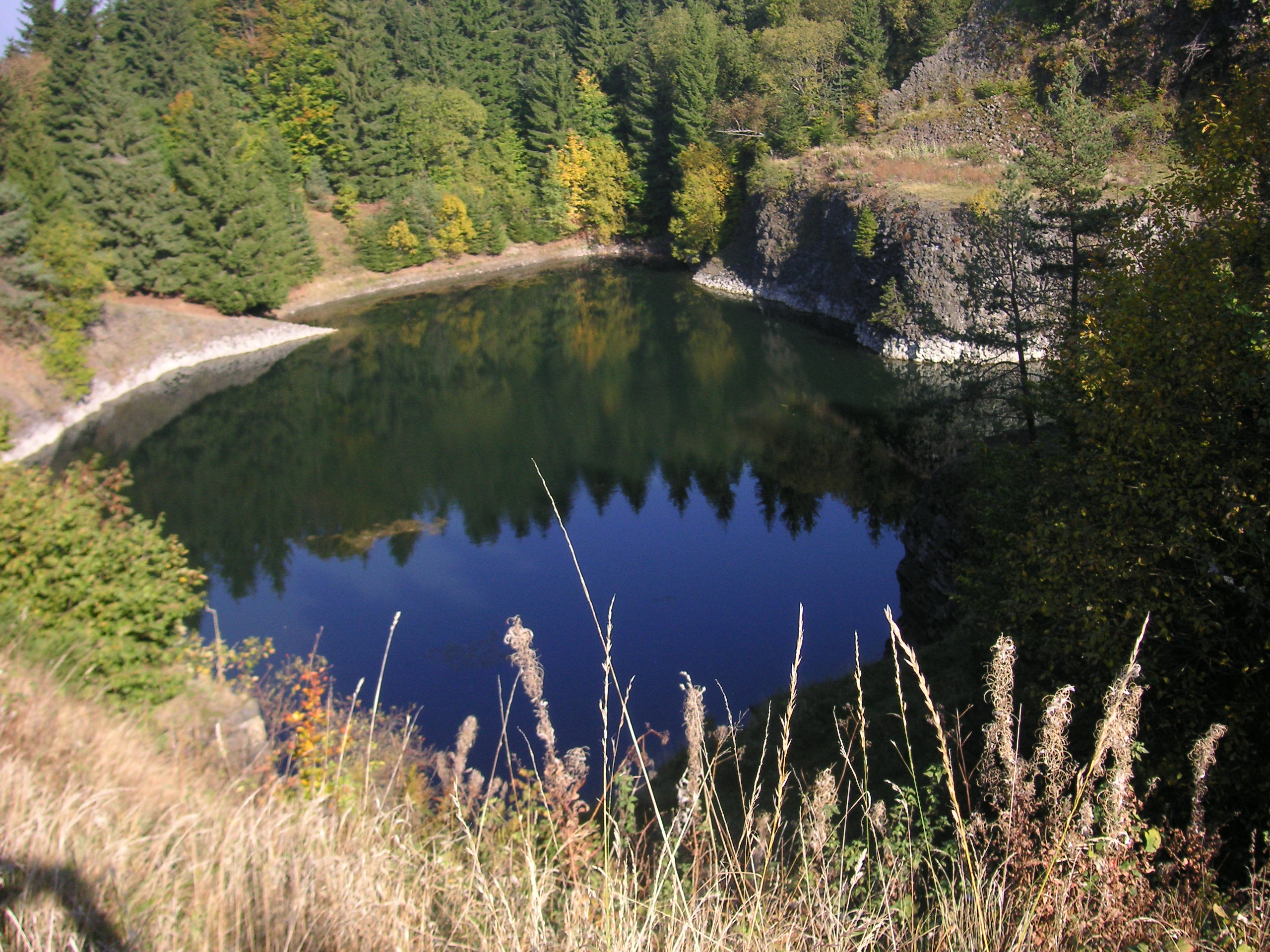 Der Basaltsee ("Tintenfass") in der Nähe des Berghauses Rhön